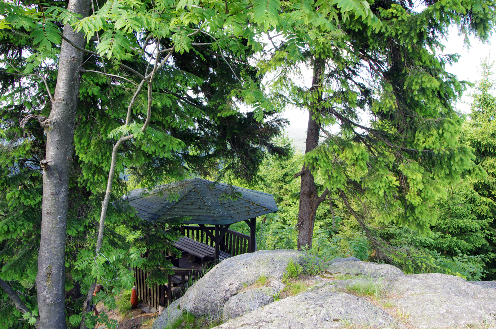 vrchol hory Špičák (990,8 m n.m.) u Přebuze, Krušné hory, nejvyšší hora okresu Sokolov